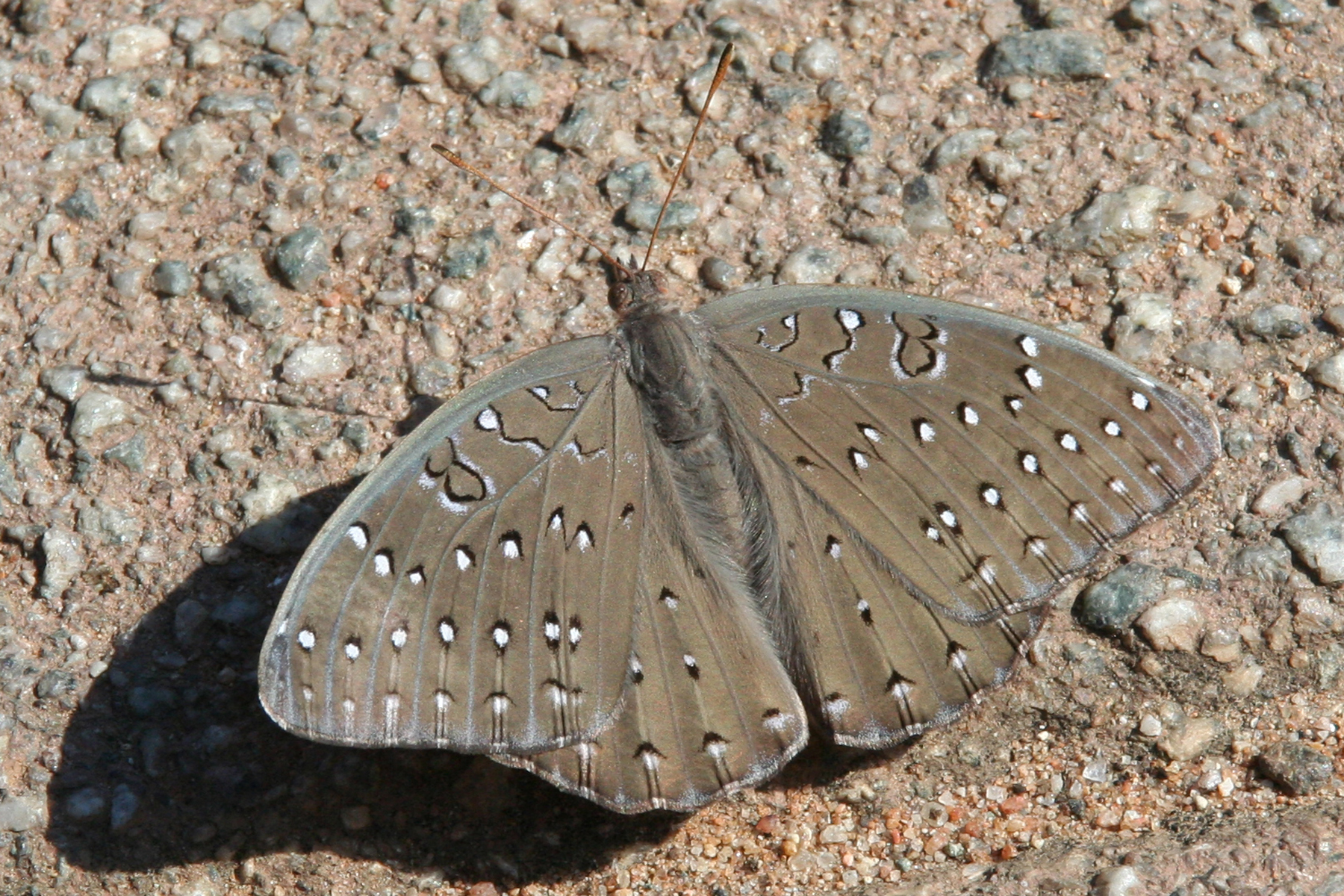 Hamanumida daedalus (Fabricius, 1775), Guineafowl